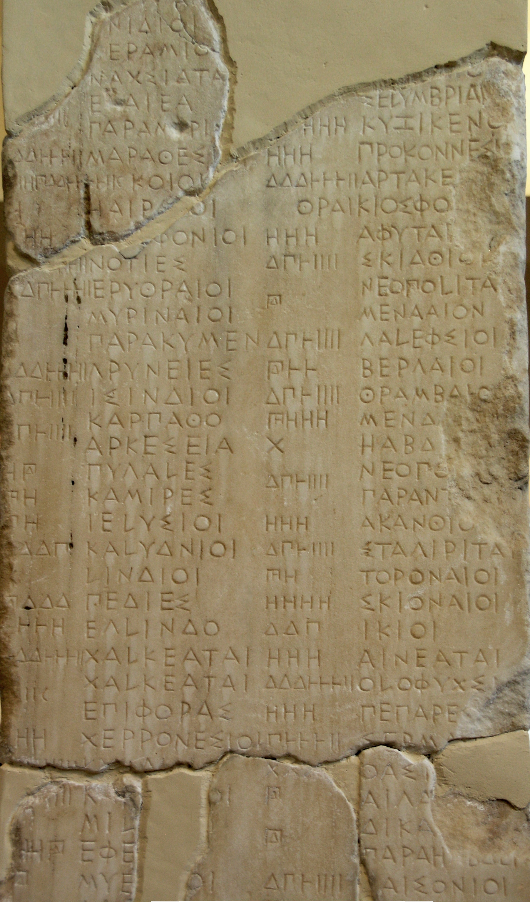 Seconde stèle épigraphique des listes de tributs pour les années 439/8-432/1 av. J.-C.